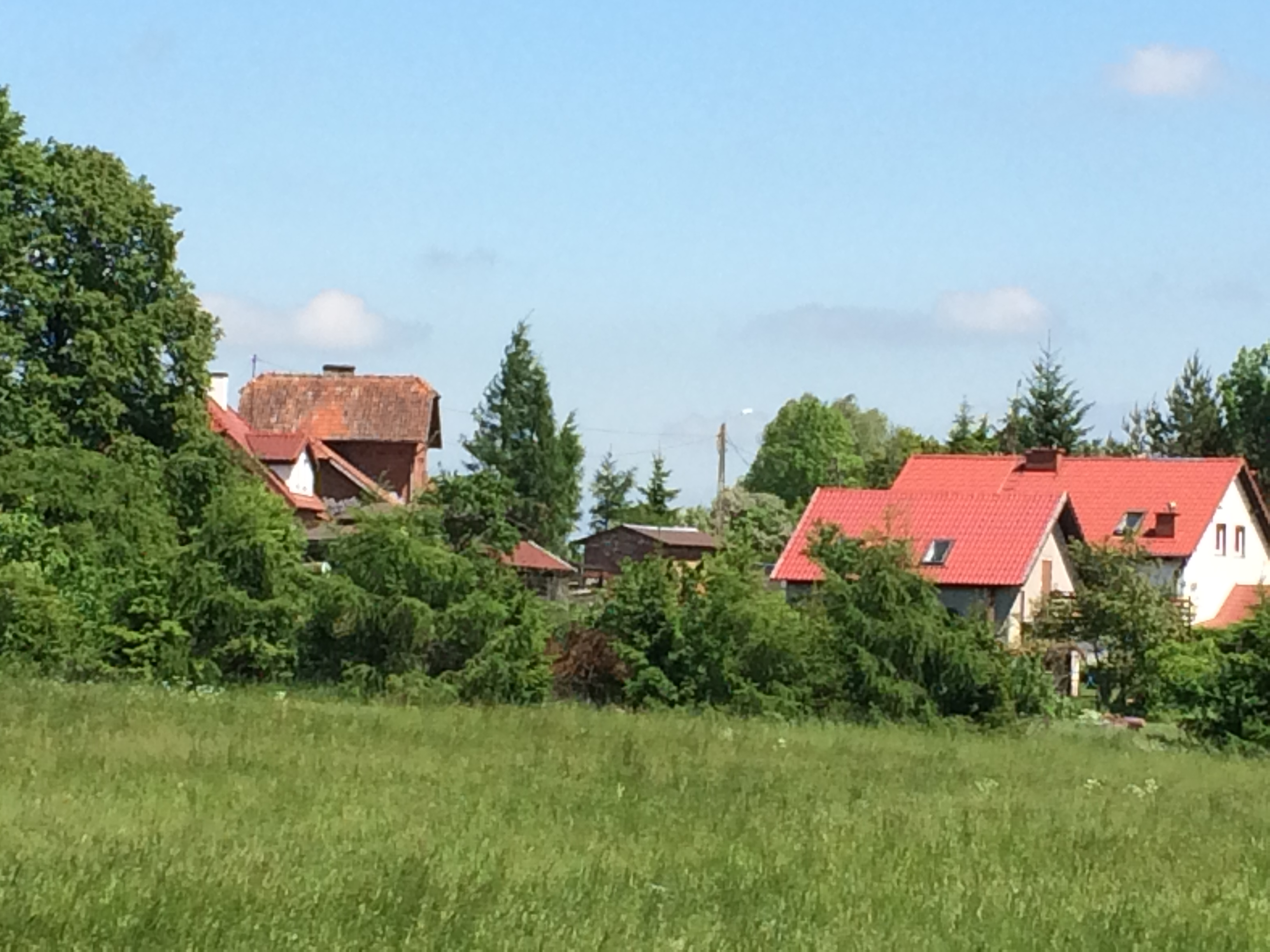 Voormalig stationsgebouw in Pieckowo